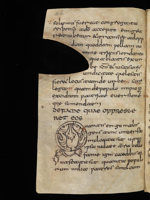 Cod. Eins. 347, Majuskel-O verzeirt mit Fischen auf schadhaftem Pergament, S. 66